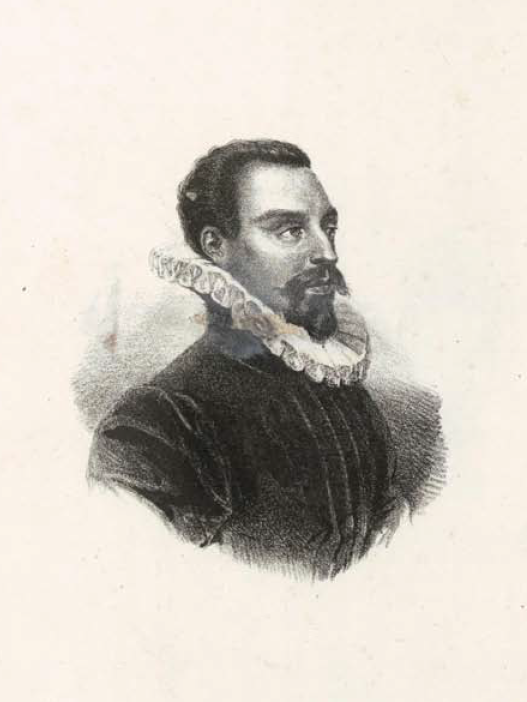 Dal Dizionario biografico degli uomini illustri di Sardegna di Pasquale Tola, 1837